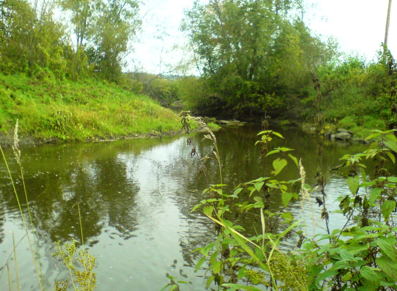 Lierelva like nedenfor Lierfossen.